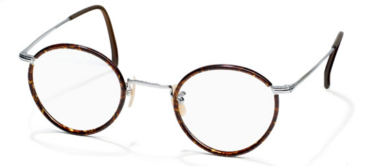 Rodenstock Brille aus den 1940er Jahren.